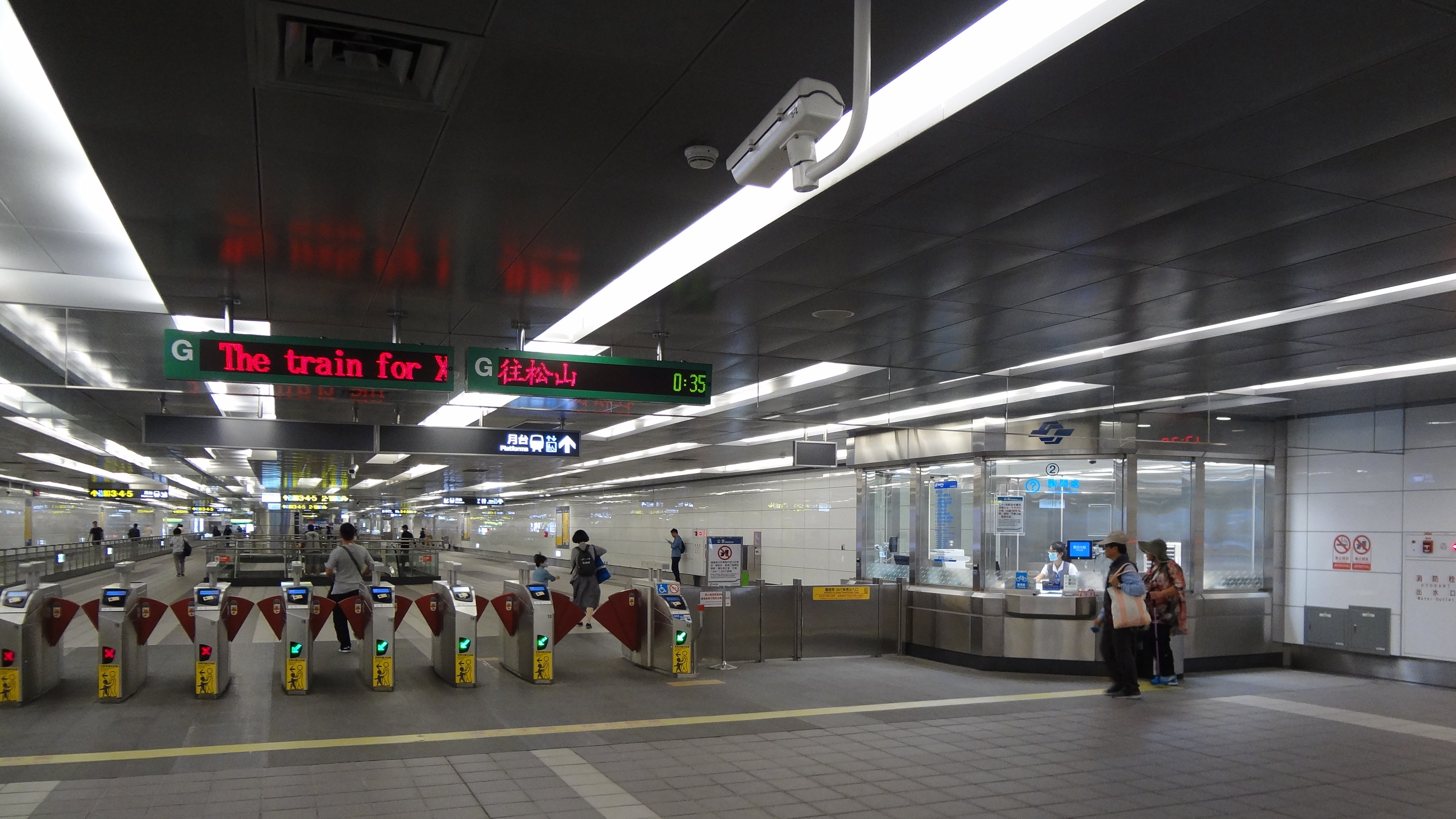 臺北捷運臺北小巨蛋站2號詢問處與驗票閘門。